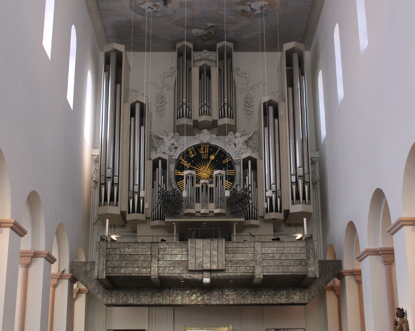 Hauptorgel des Würzburger Domes (1968/2012, Klais, V/87)